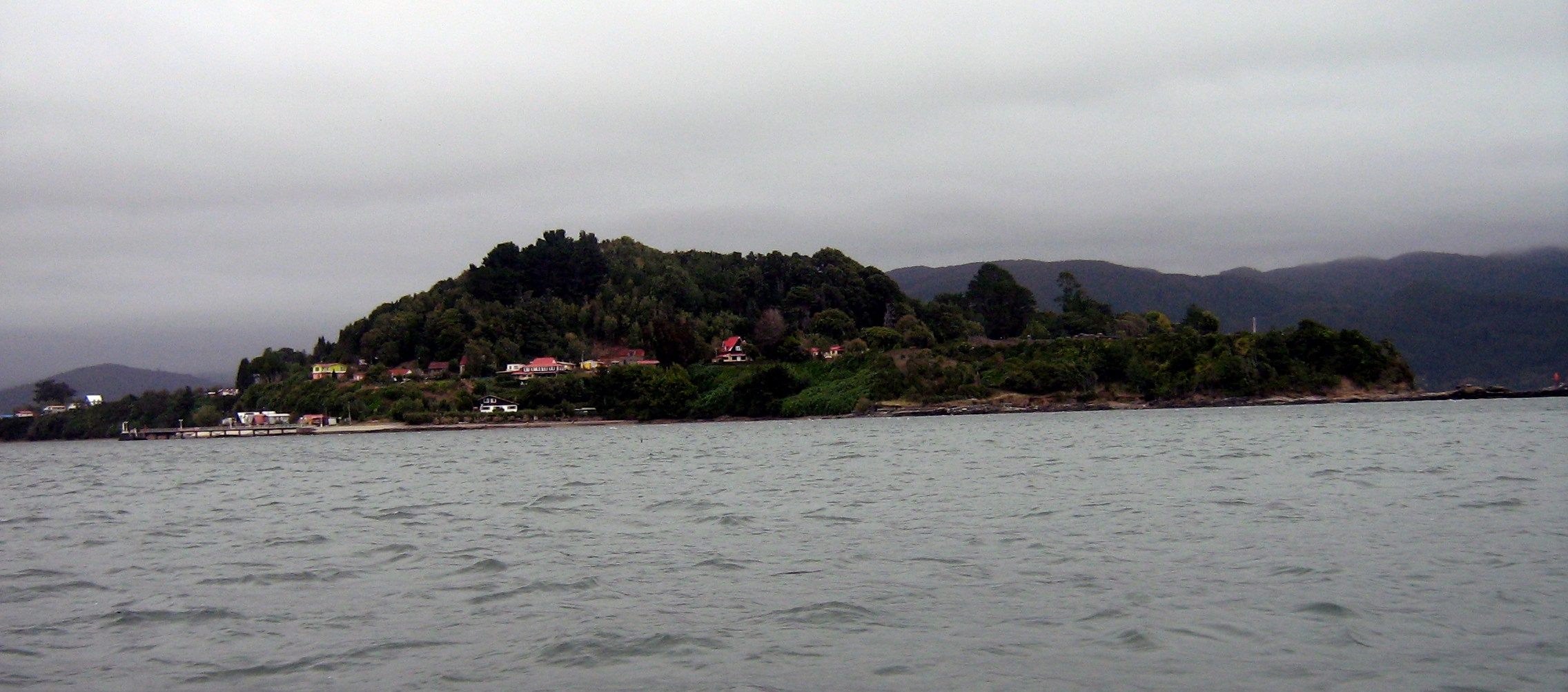 Isla Mancera desde una embarcación con rumbo a ella